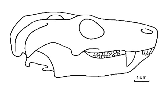 Trirachodon skull